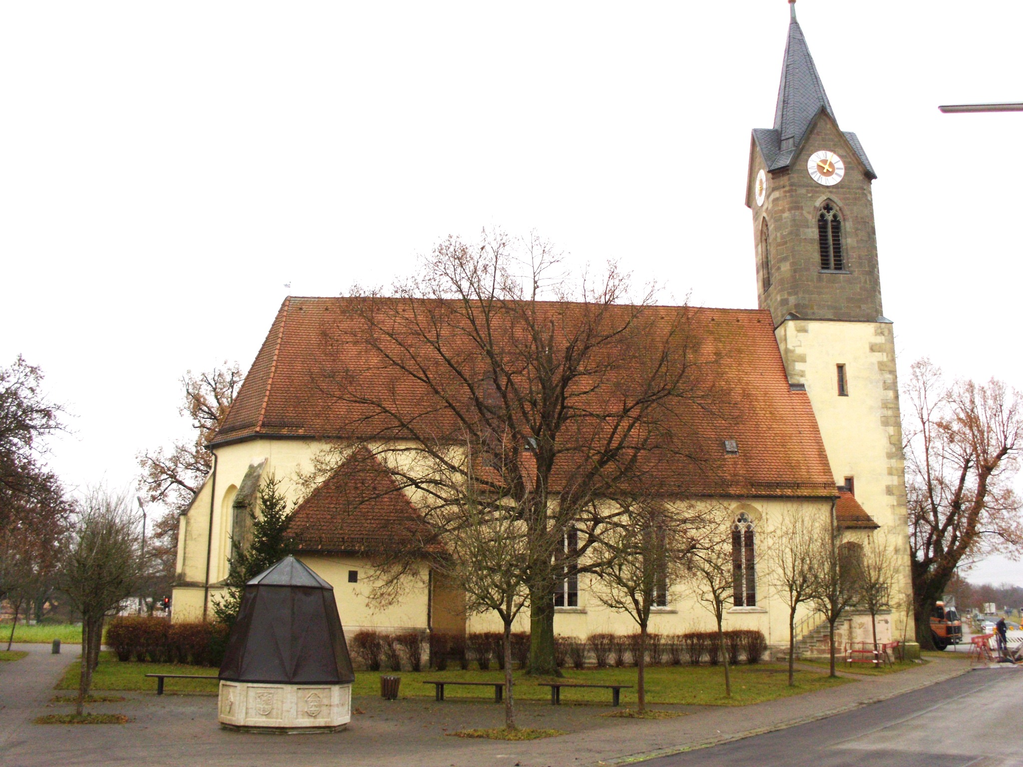 Evang. Kirche St. Jodokus in Gunzenhausen-Unterwurmbach, Landkreis Weißenburg-Gunzenhausen (Bayern), Nordansicht